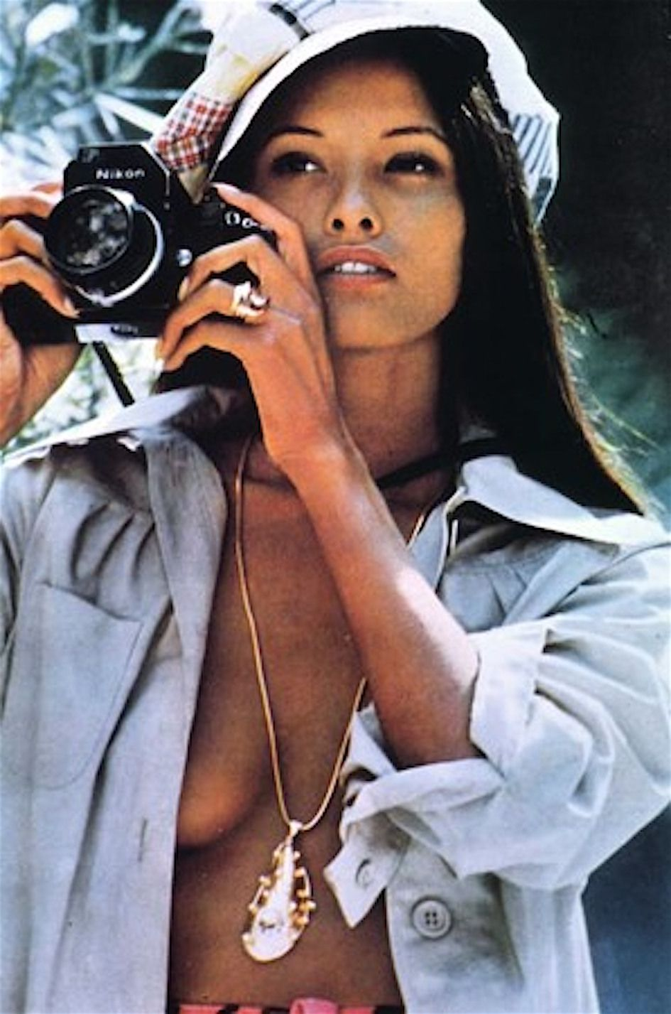 Laura Gemser en un fotograma del film Emanuelle nera, dirigido por Bitto Albertini en 1975.